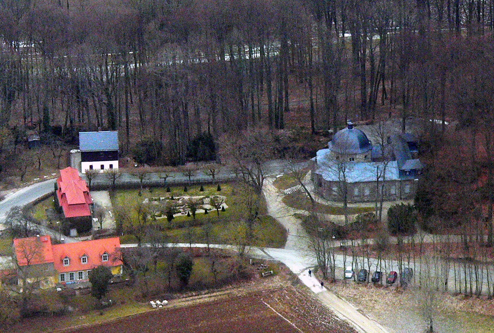 Felsengarten Sanspareil, Parterre mit Küchenbau (links) und Morgenländischem Bau (rechts) - Fränkische Schweiz, Bayern